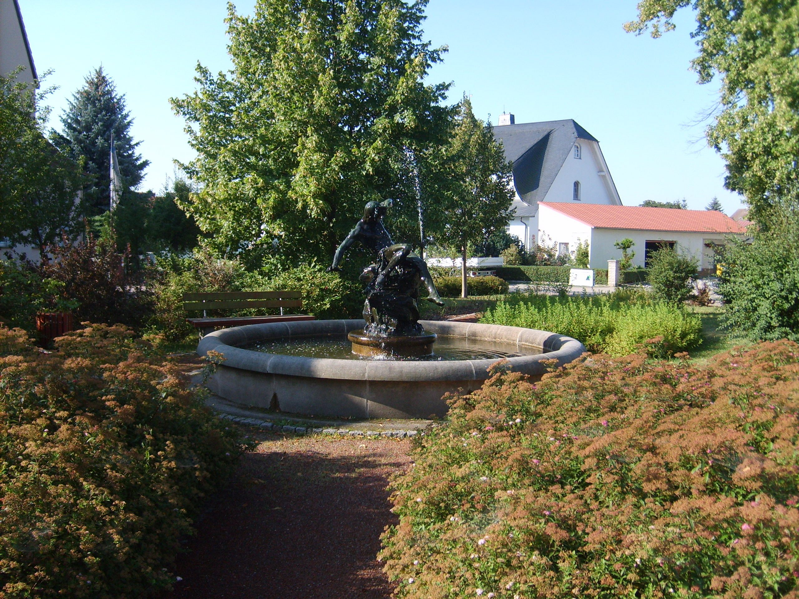 Saathain -Denkmalgeschützter Springbrunnen